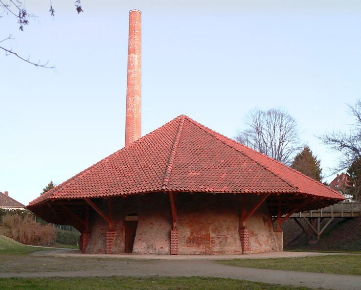 Historischer Kalkbrennofen im Willy Spahn Park in Hannover